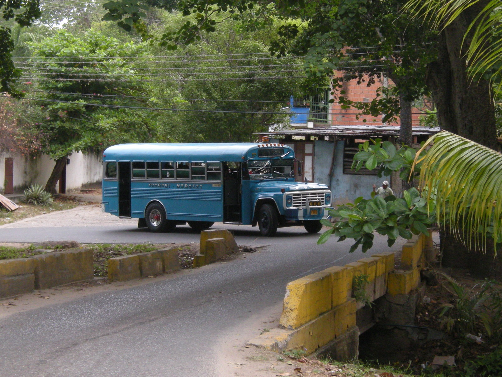 Puerto Colombia, Venezuela